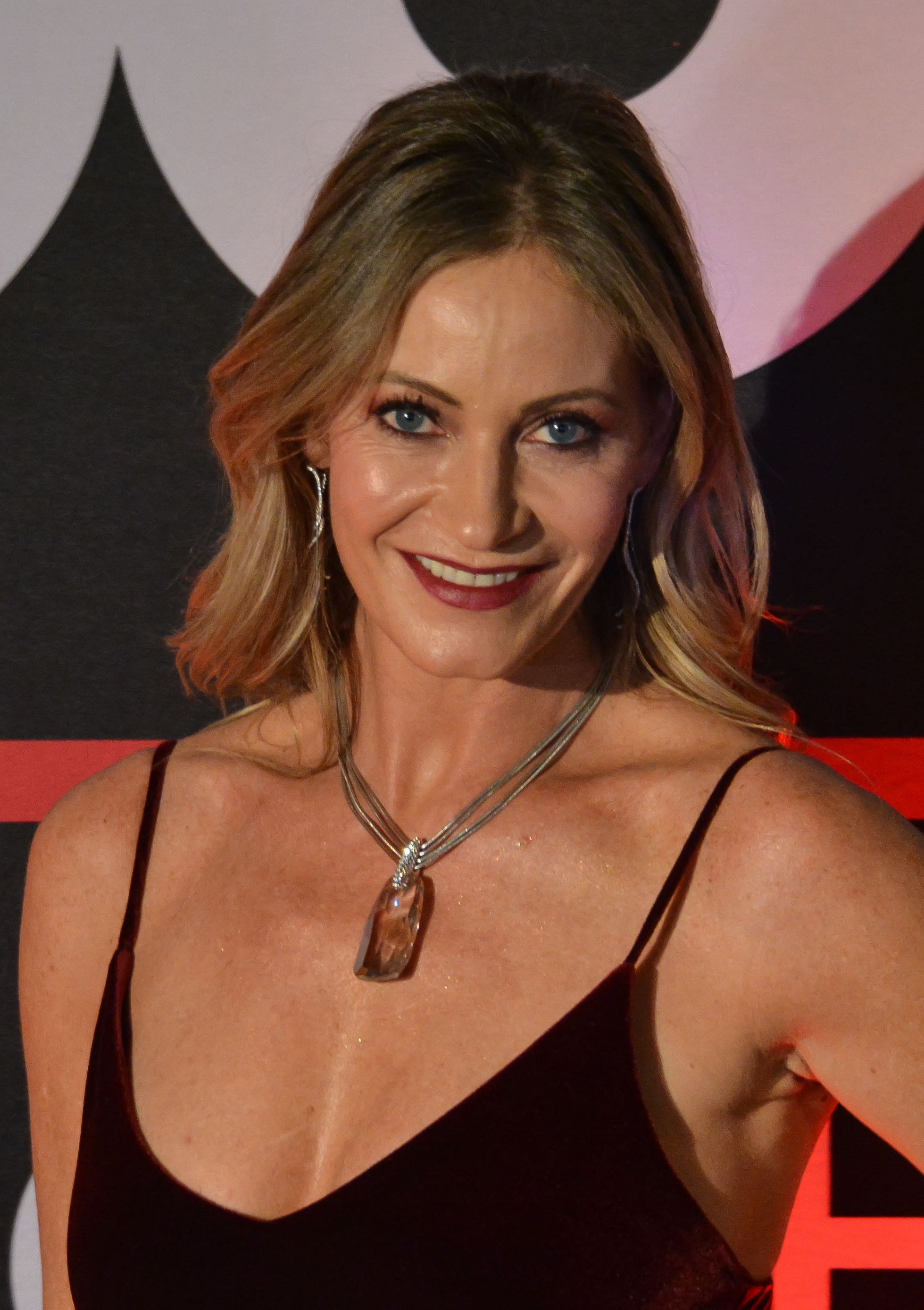 Gala Billboard Latin Music Showcase Chile 2018, Hotel Santiago, Santiago, Chile